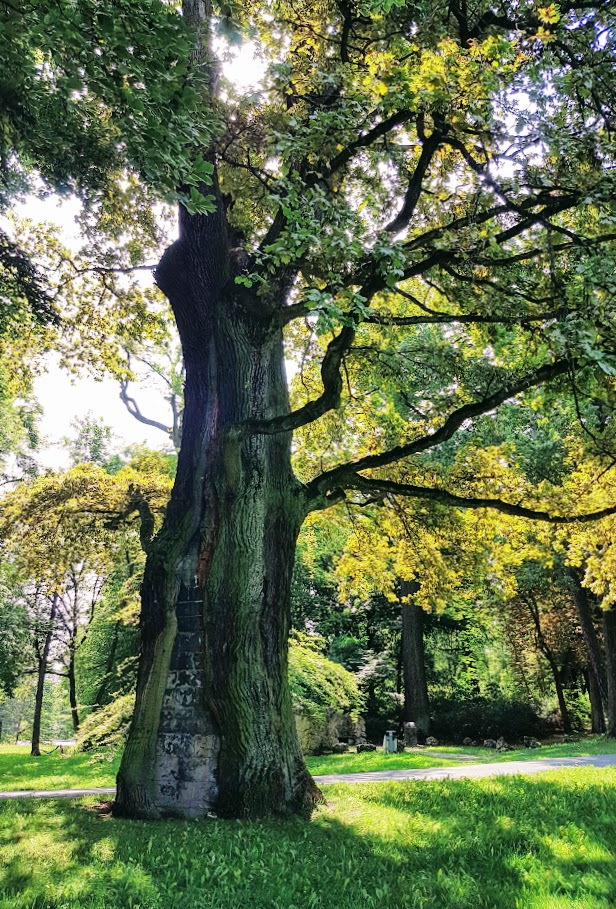 Naturdenkmal 350-jährige Eiche auf dem Platnersberg in Nürnberg (2017)